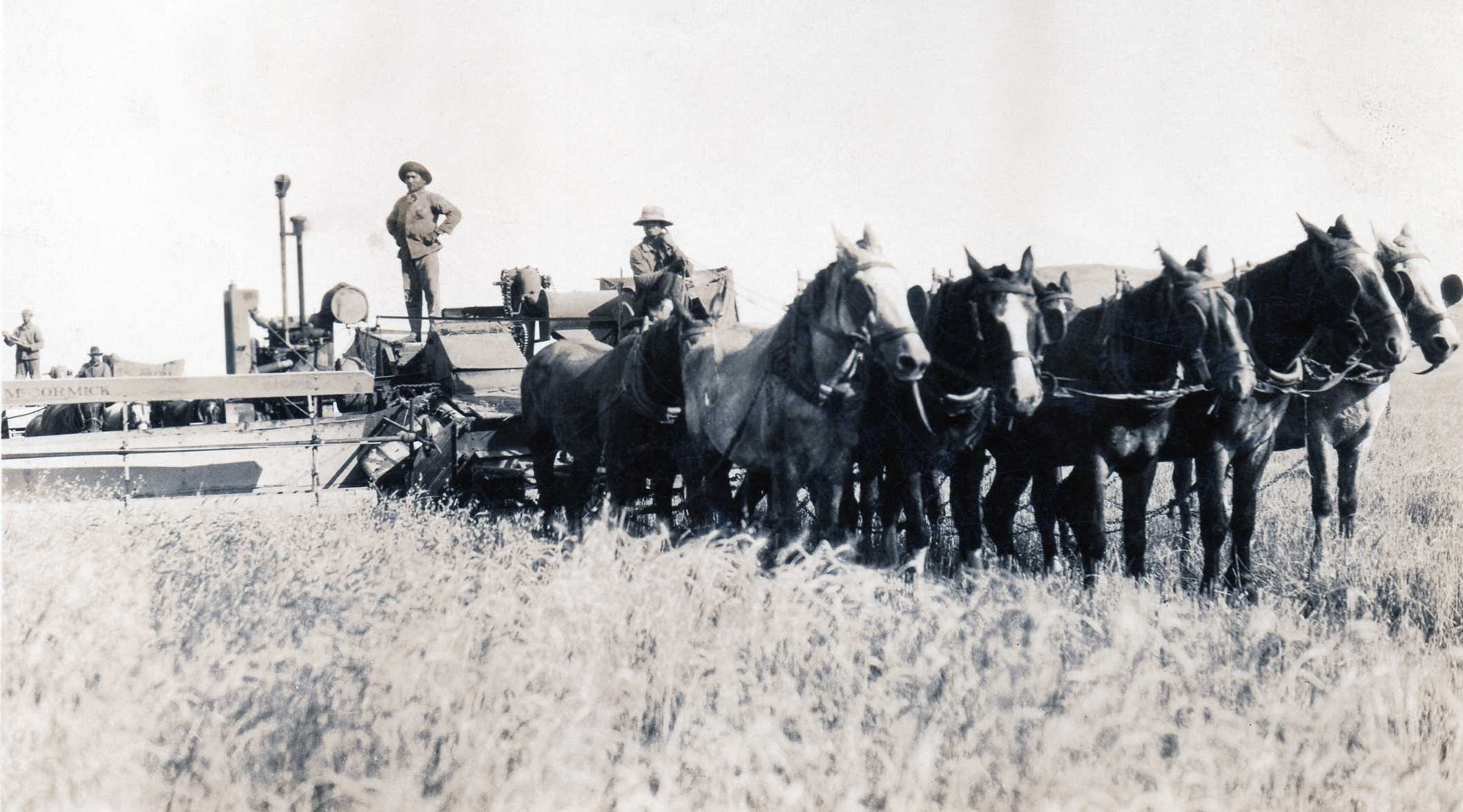 Comandancia del Fuerte Argentino